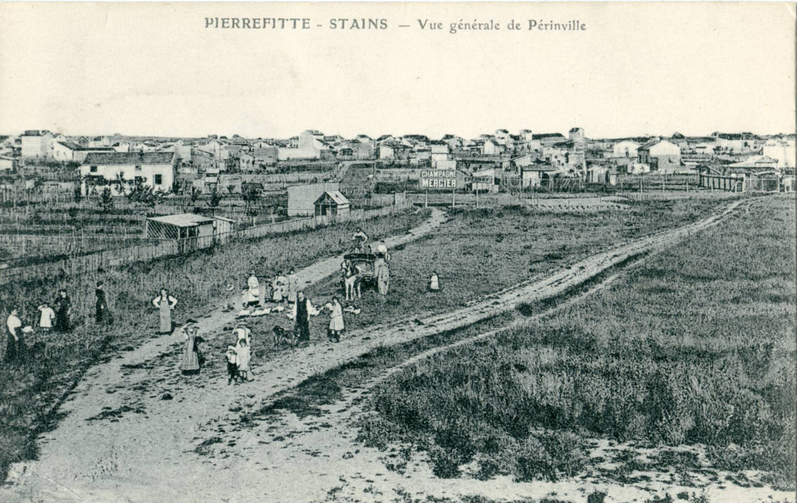 Carte postale ancienne éditée par ELD PIERREFITTE - STAINS : vue générale de Périnville